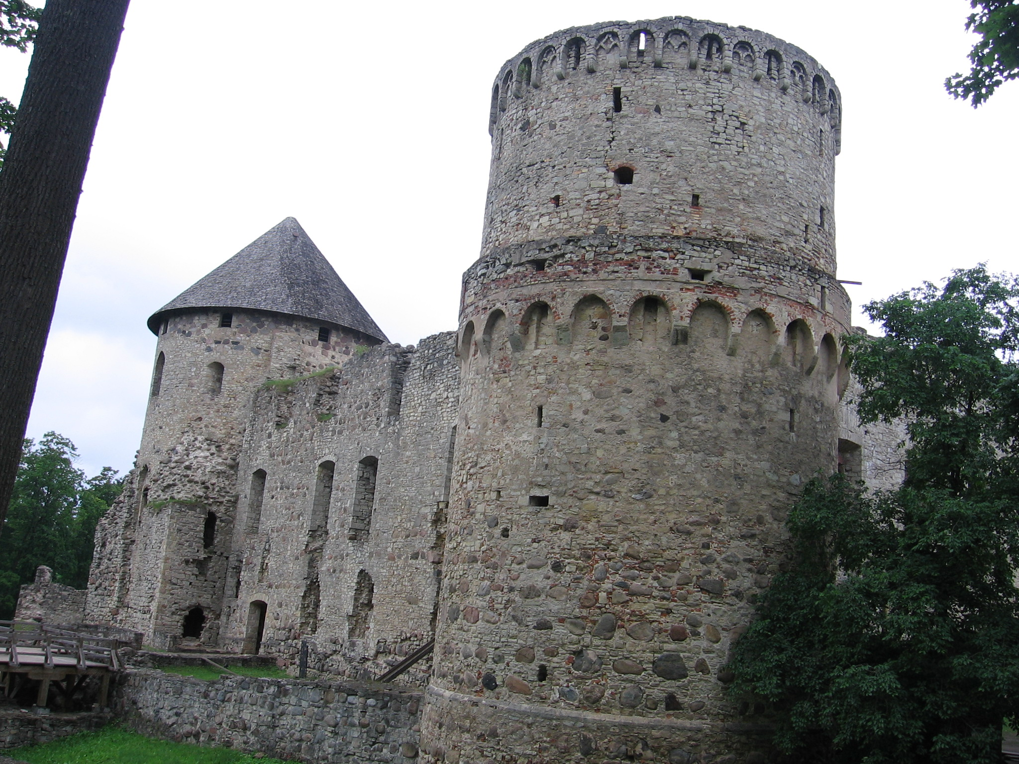 Võnnu ordulinnuse elutorn ja üks suurtükitornidest